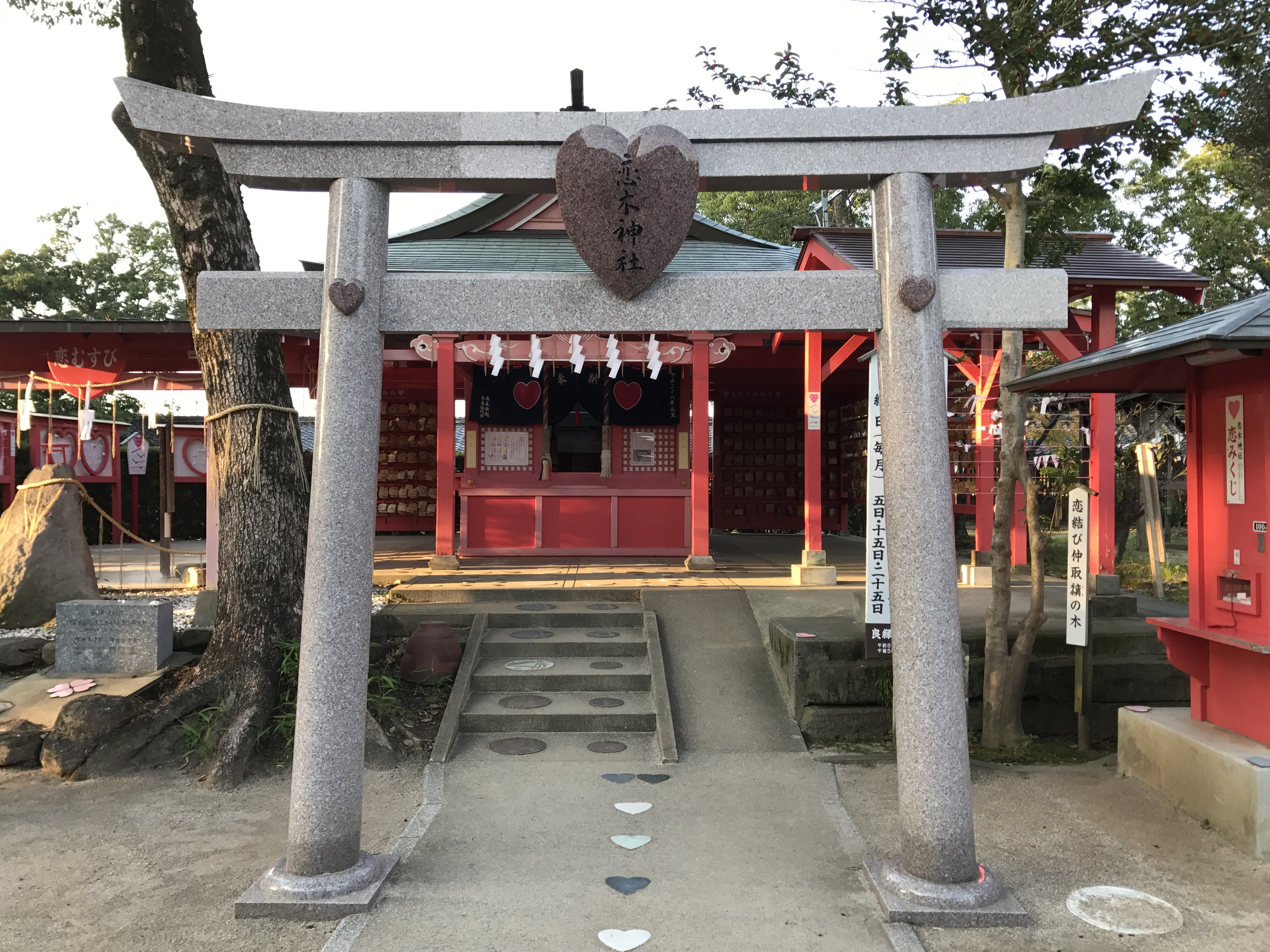 水田天満宮境内の恋木神社